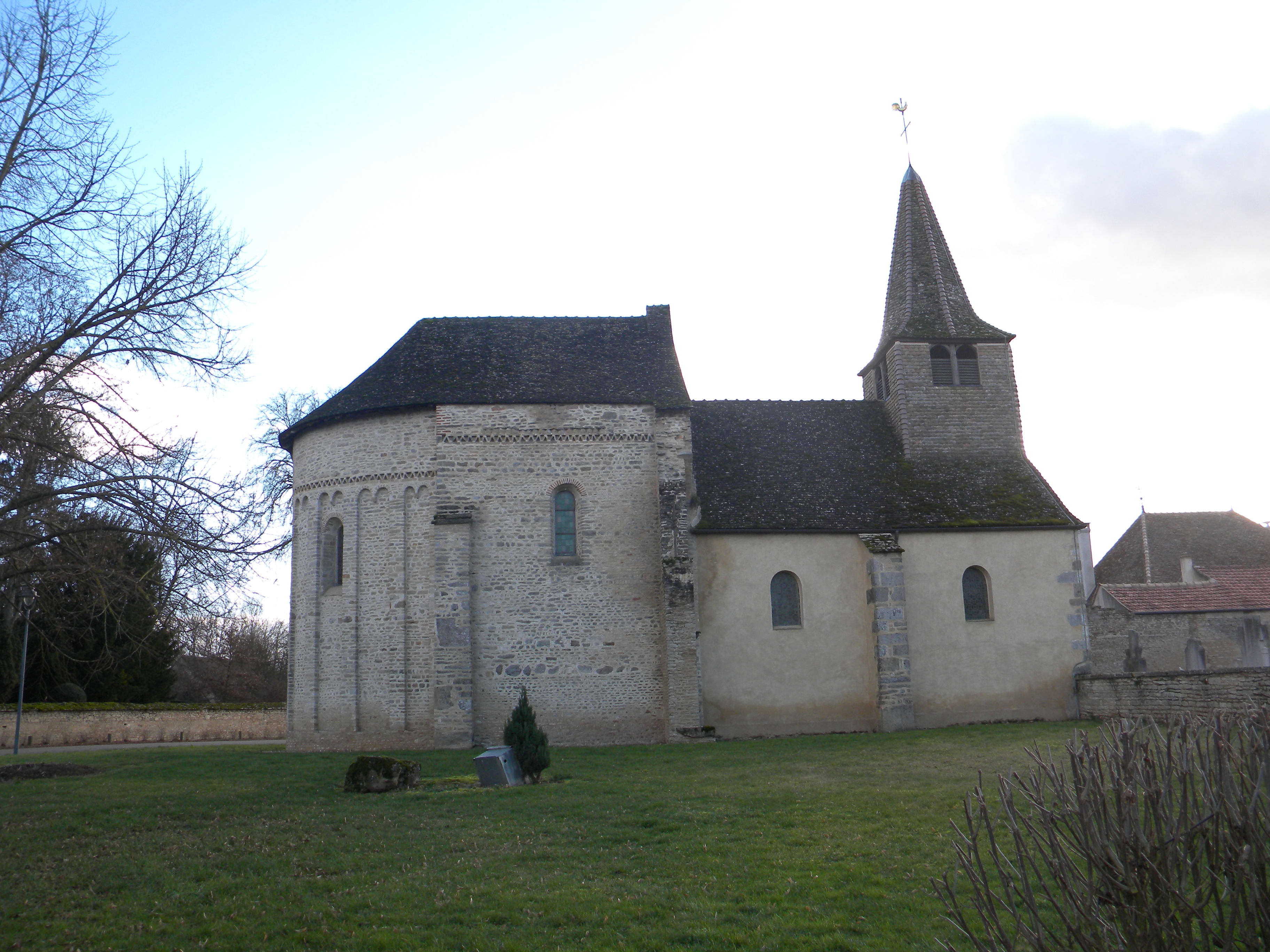 Preĝejo de Combertault (Côte-d'or)